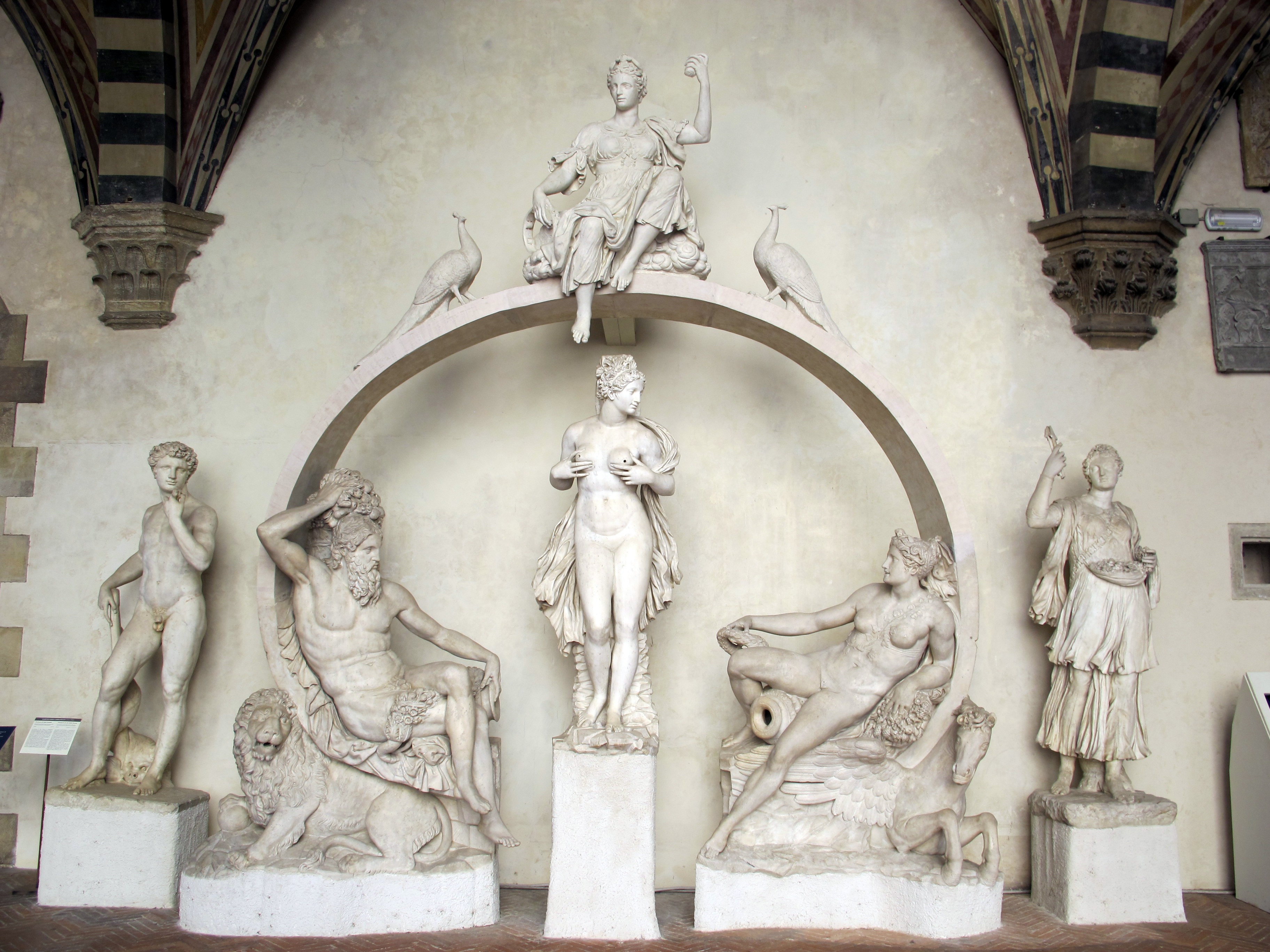 Bartolomeo ammannati, fontana di sala grande, 1556-1561